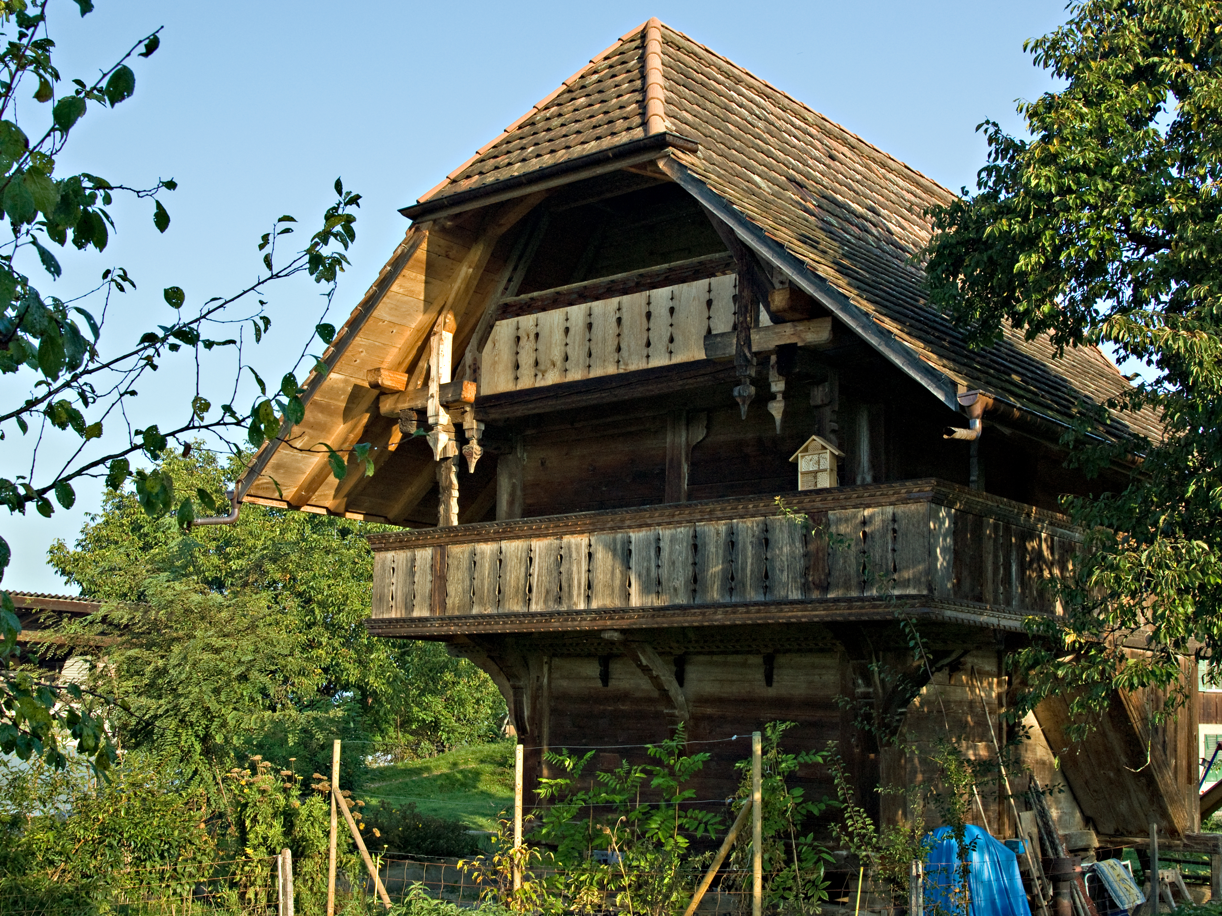 Mühledorf, alter Speicher